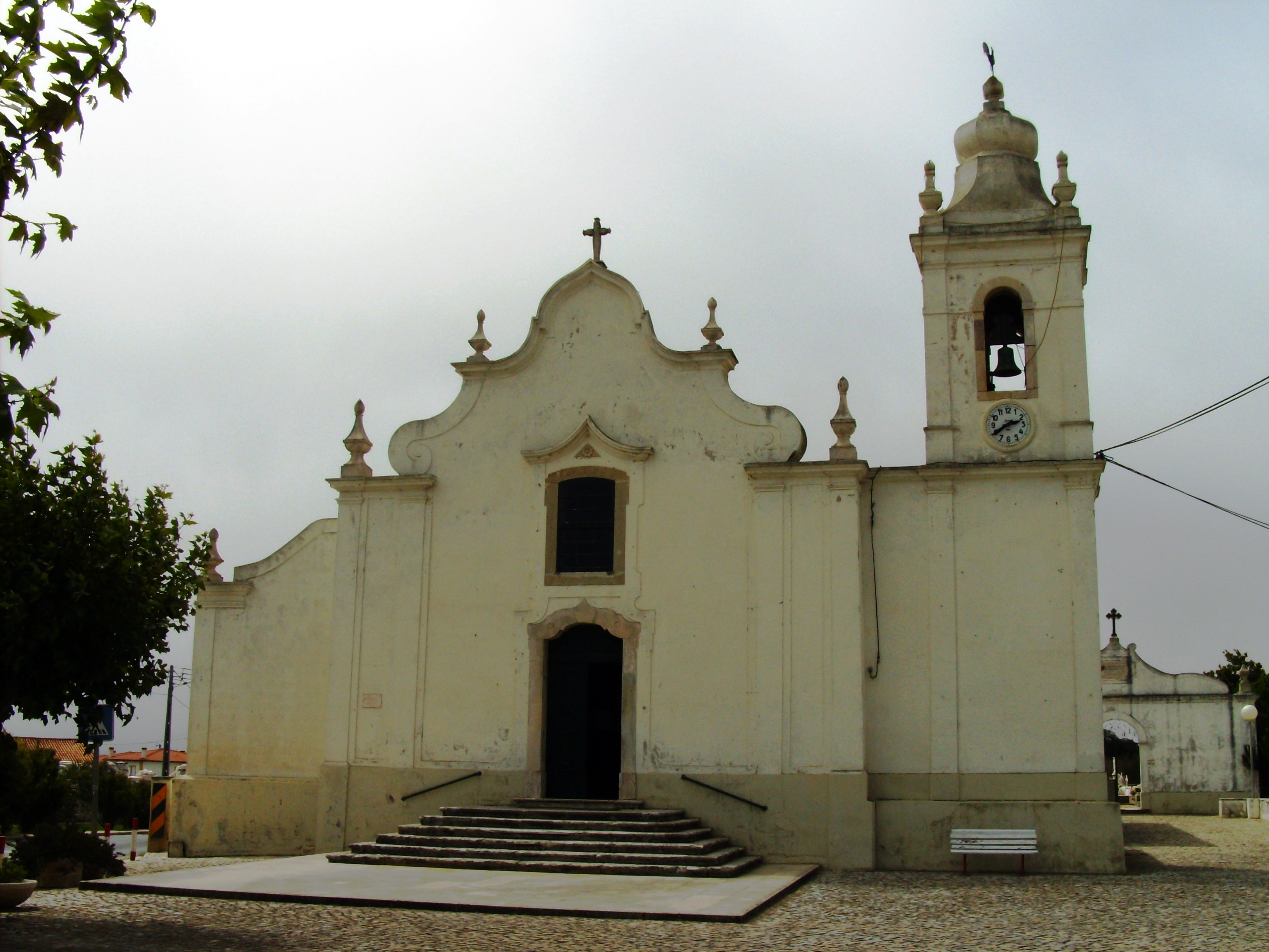 Igreja Matriz de São João Baptista de Alfeizerão, concelho de Alcobaça, distrito de Leiria, Portugal.